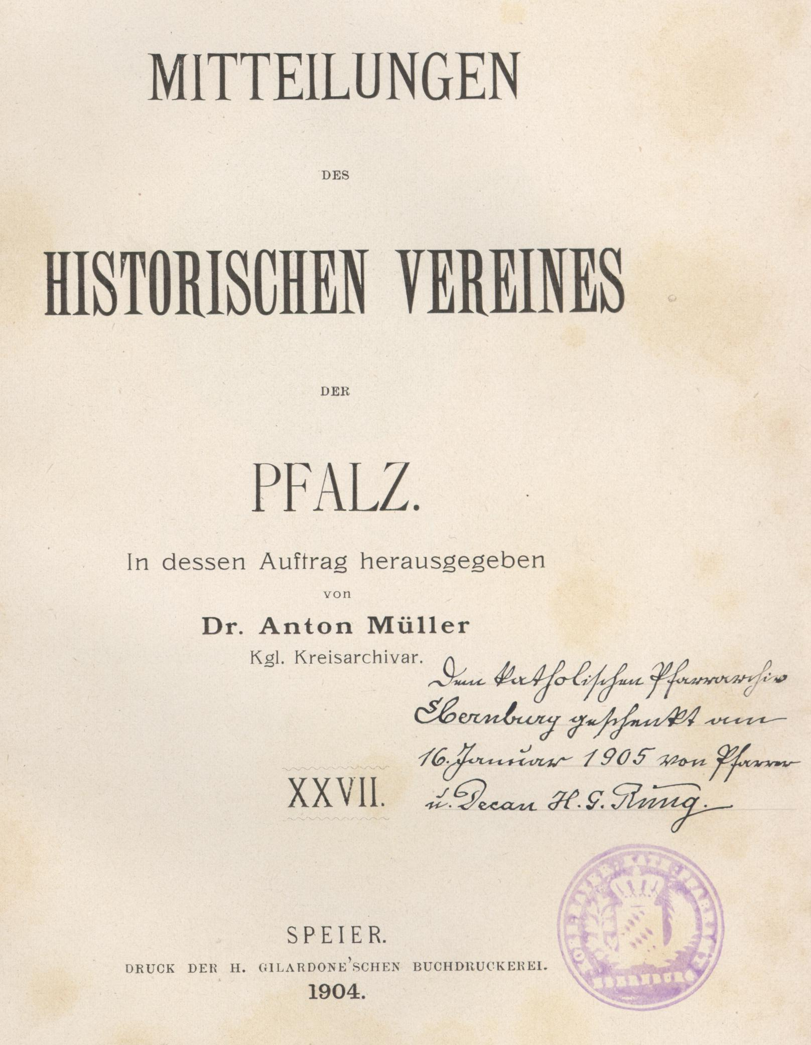 Pfarrer Heinrich Georg Rung, Ebernburg, persönliche Widmung